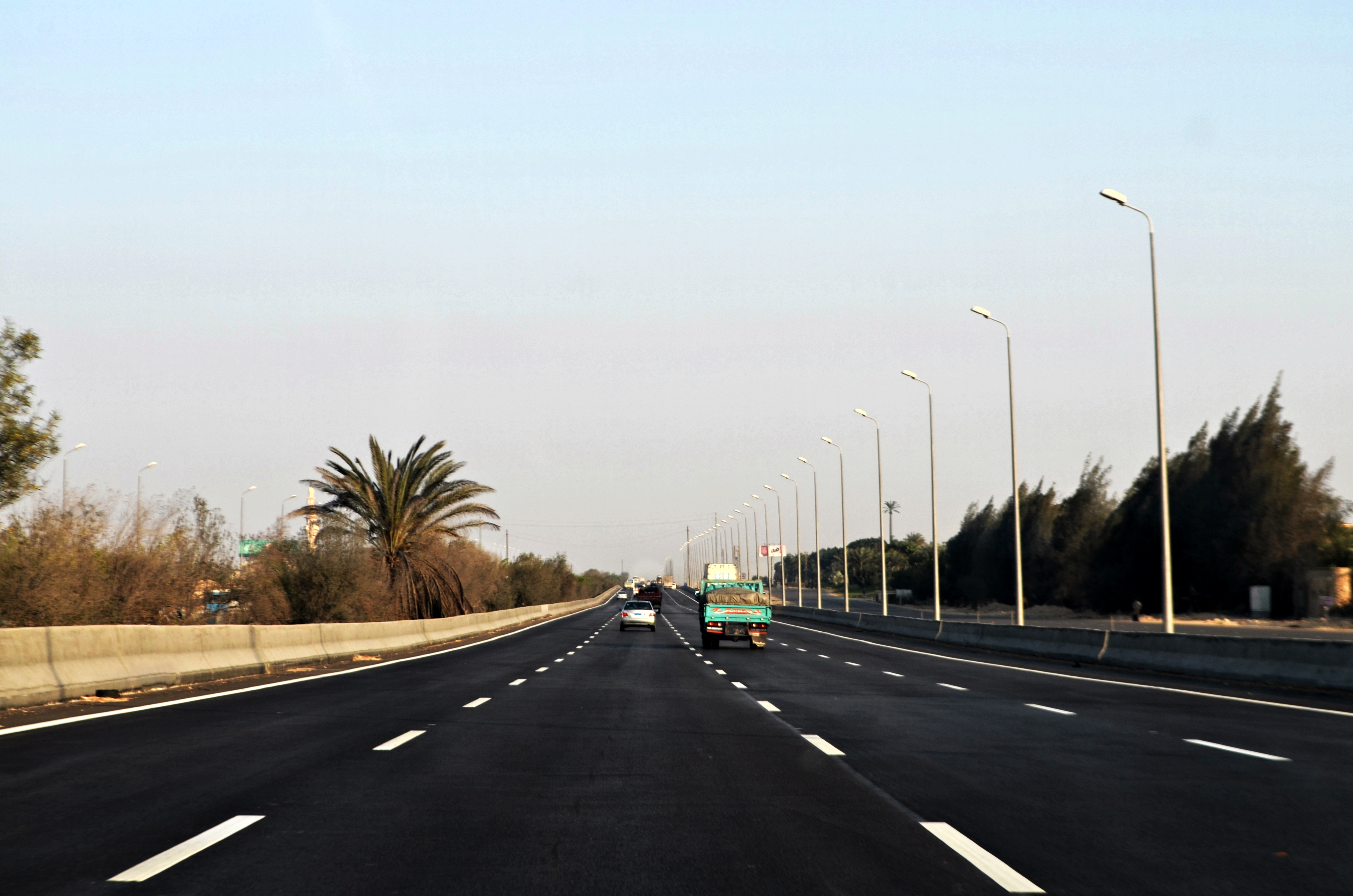 طريق القاهرة الإسكندرية الصحراوي، تجاه القاهرة